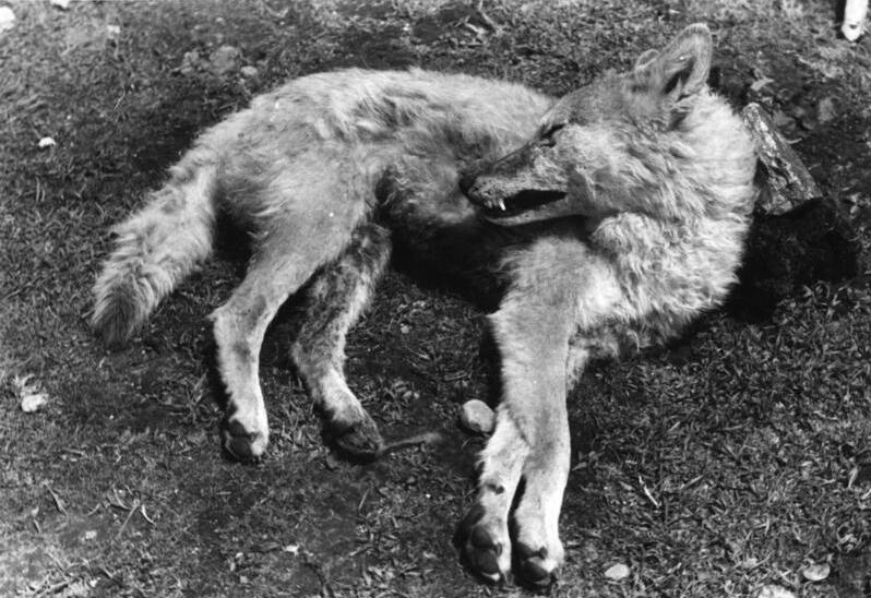 Tibetischer Wolf